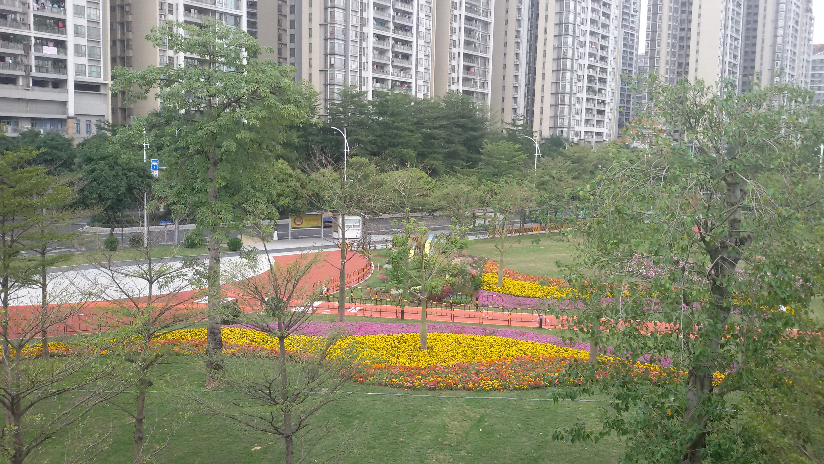 粵語: 臨江帶狀公園